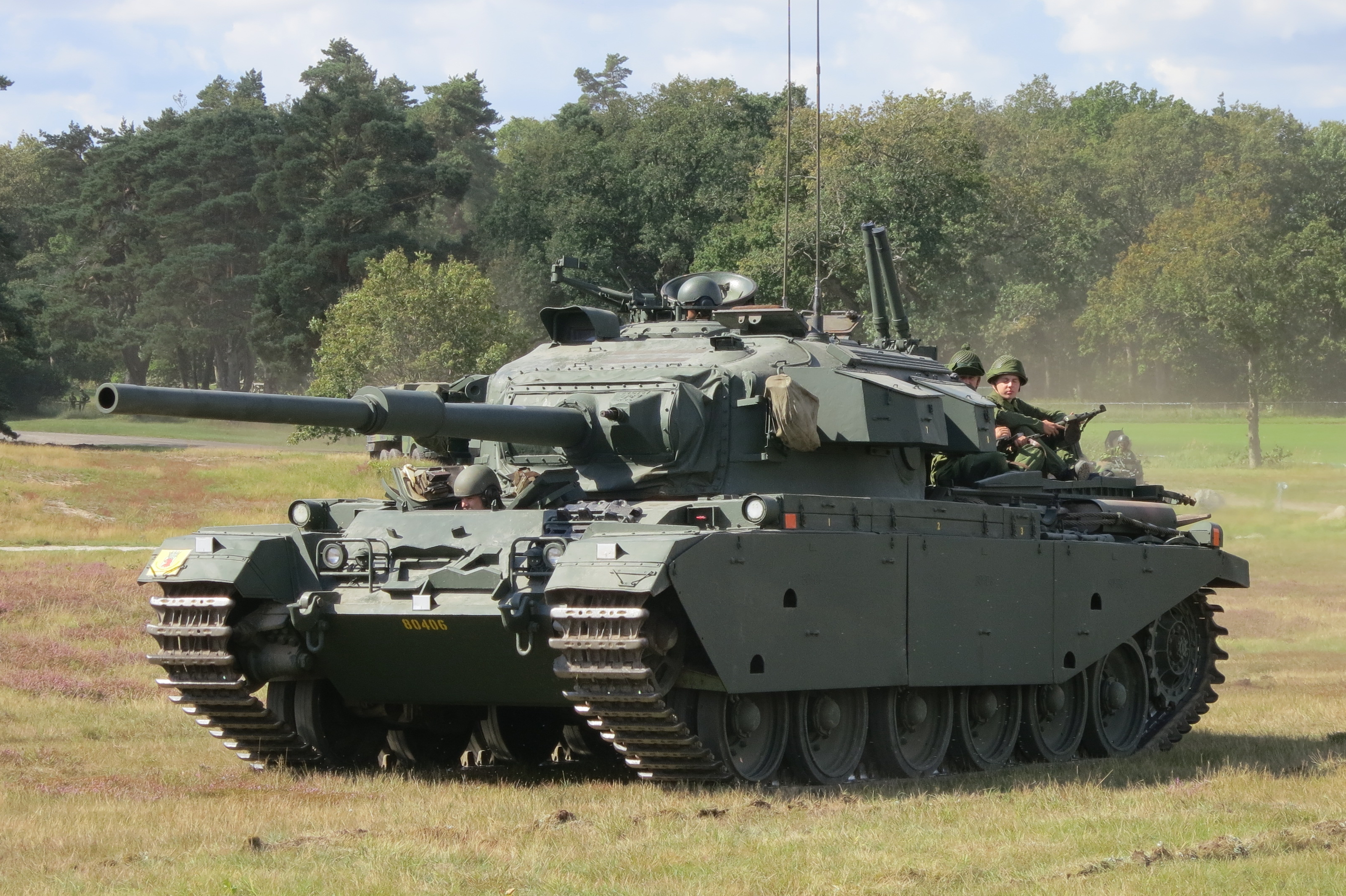 Stridsvagn 102 vid Regementets Dag på P7 Revingehed